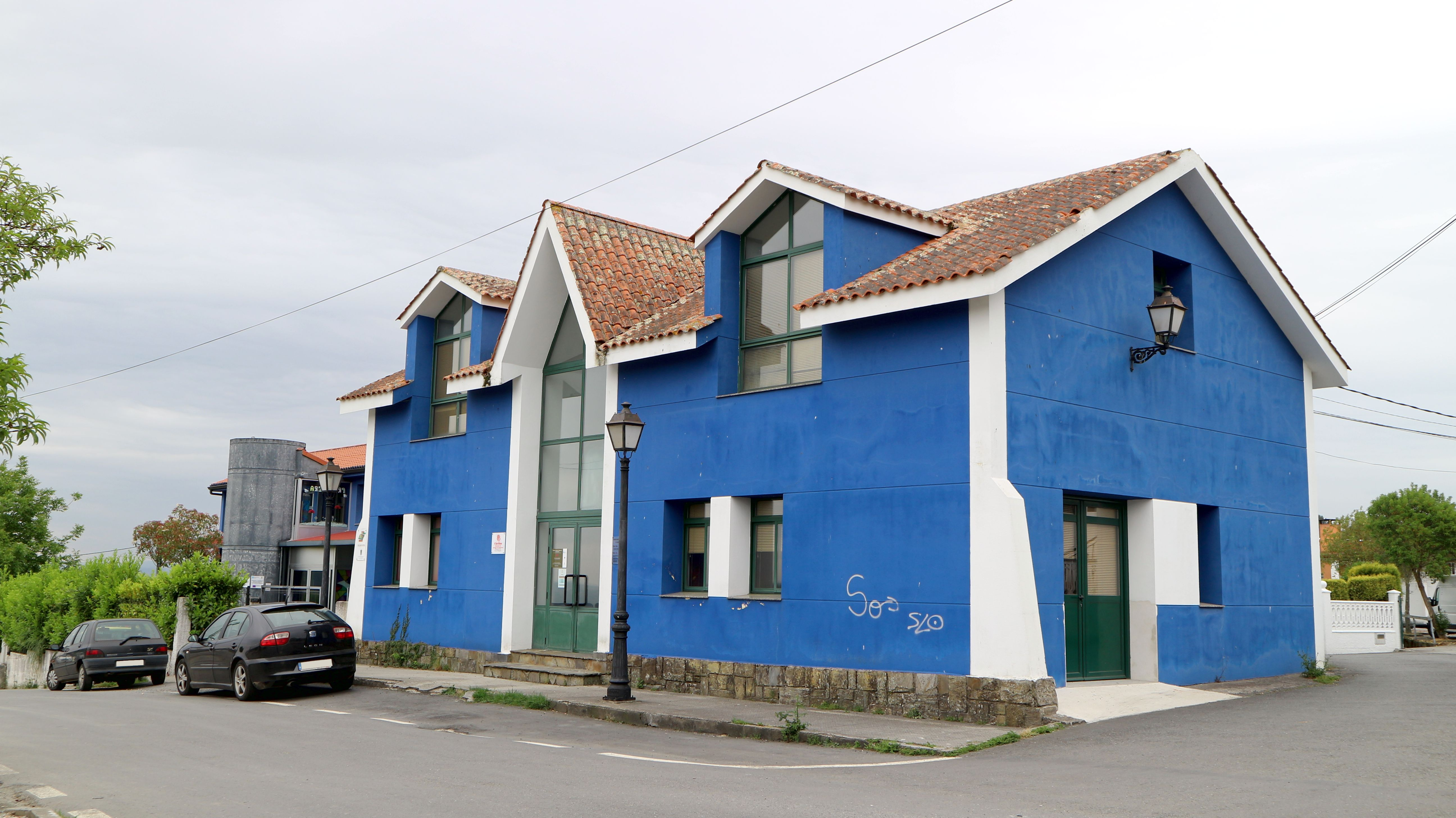 Escola Infantil "Pasiños" do Concello de Abegondo. Na Ferreira, Mabegondo, Abegondo.